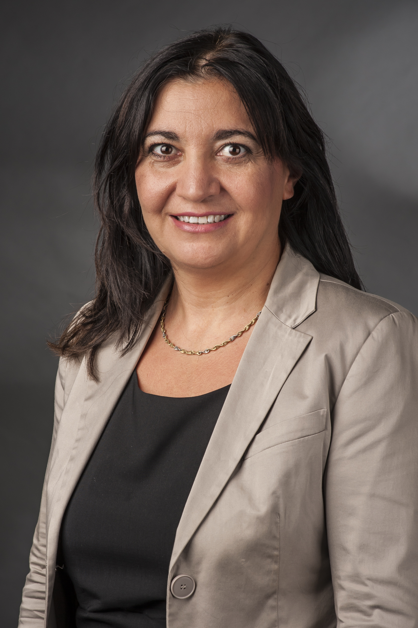 Ekin Deligöz (* 21. April 1971 in Tokat, Türkei) ist eine deutsche Politikerin (Bündnis 90/Die Grünen). Sie ist seit 1998 Mitglied des Deutschen Bundestages und seit 2013 Mitglied des Haushaltsausschuss für die Bundestagsfraktion Bündnis 90/Die Grünen.